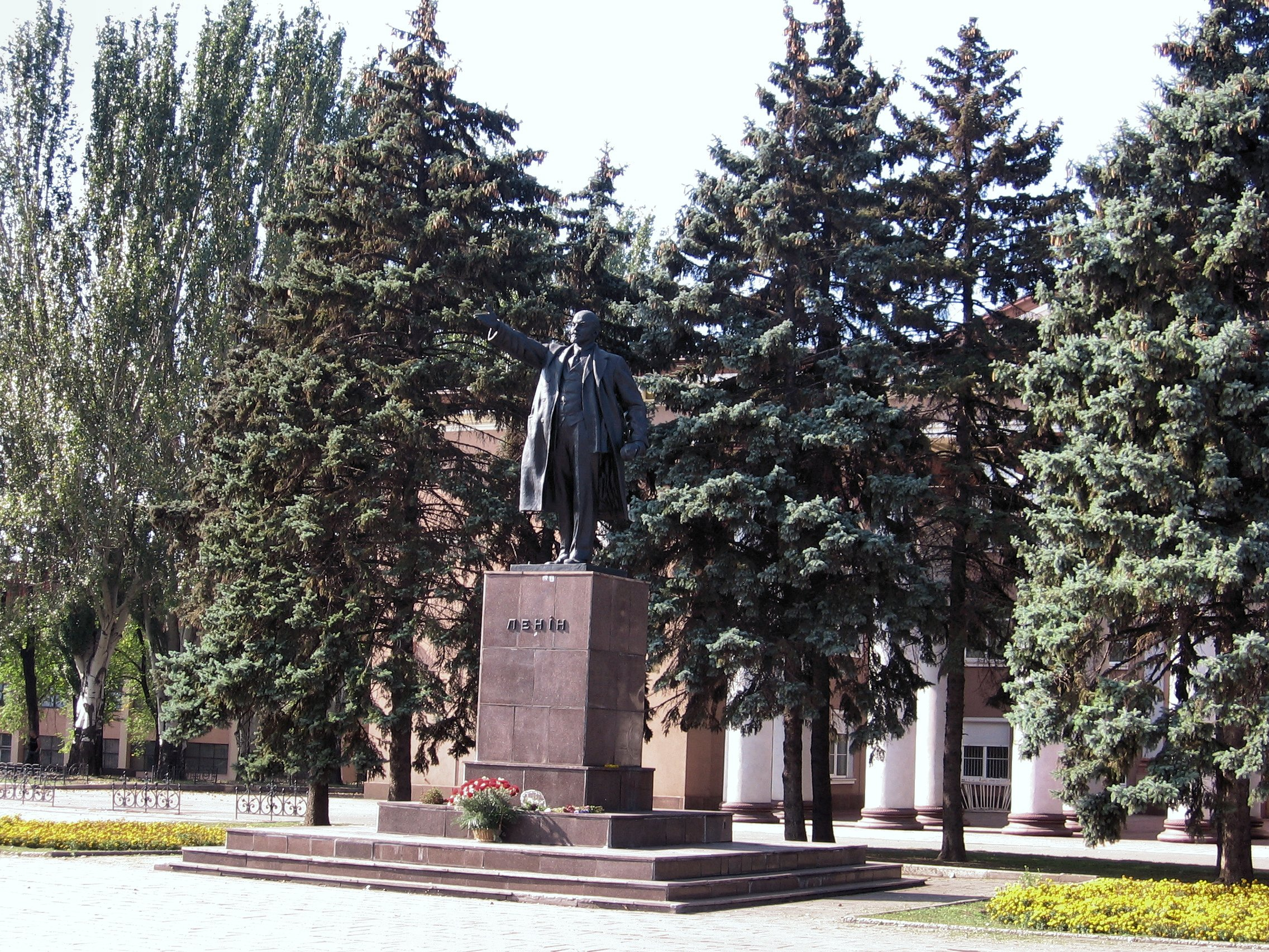 Пам’ятник В.І. Леніну (пр. Металургів)